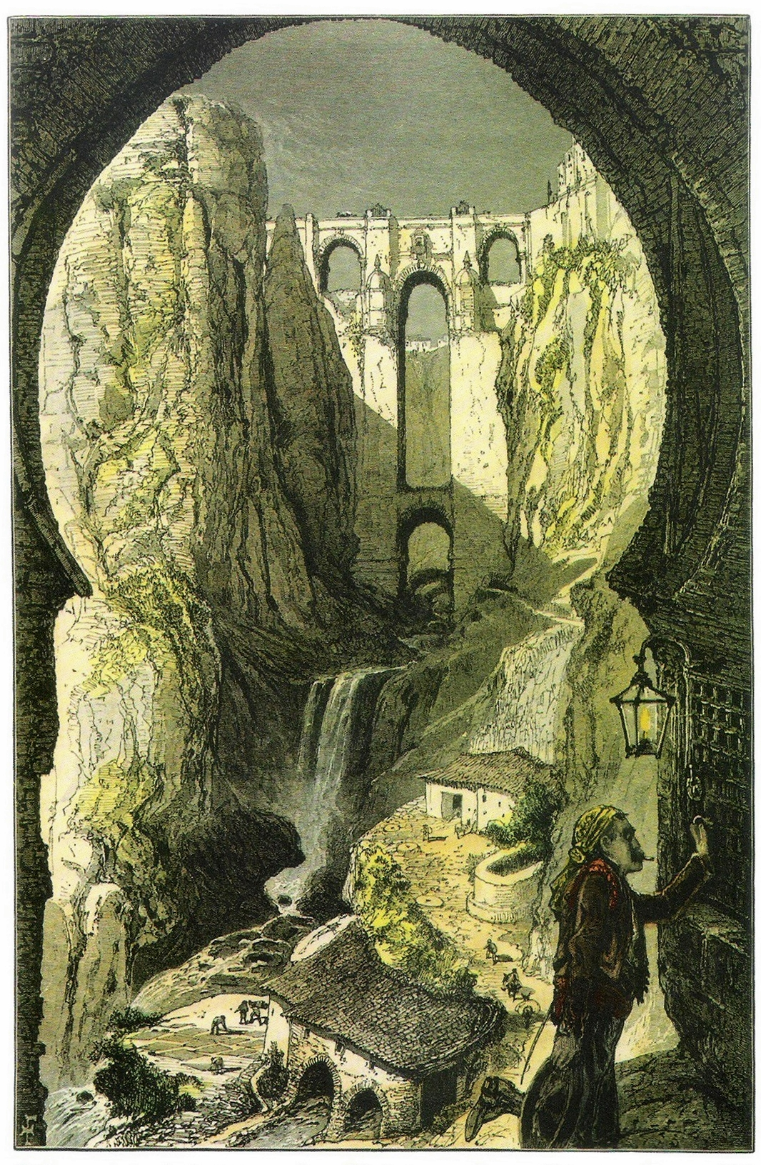 Puente Nuevo de Ronda desde los molinos. Dibujo coloreado. En Picturesque Europe (1876-1879).